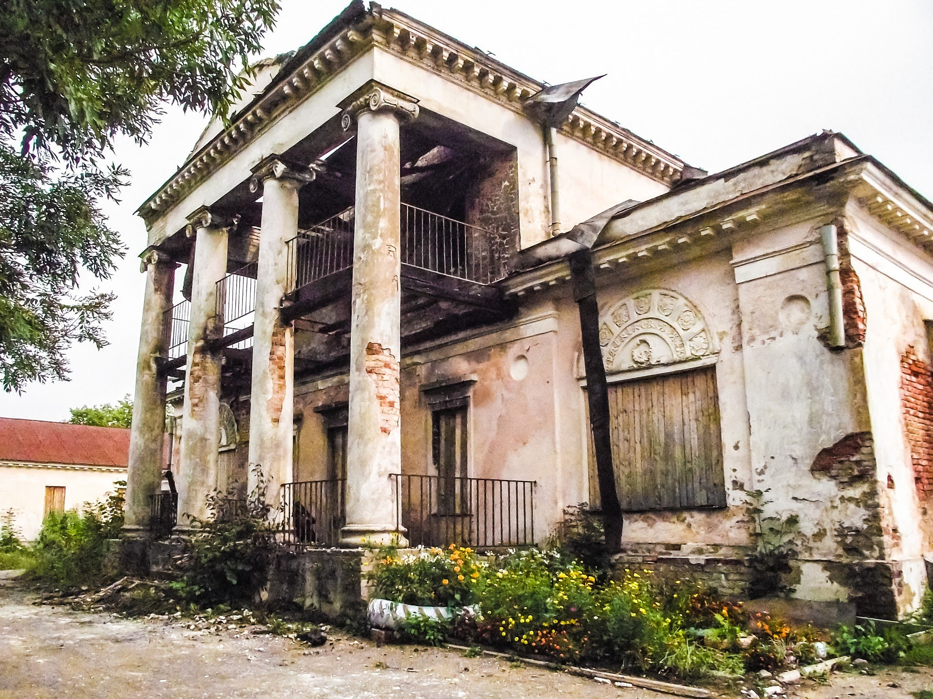 Главный дом с флигелями (два) и переходными галереями: Подгороднее, Торопецкий район, Тверская область